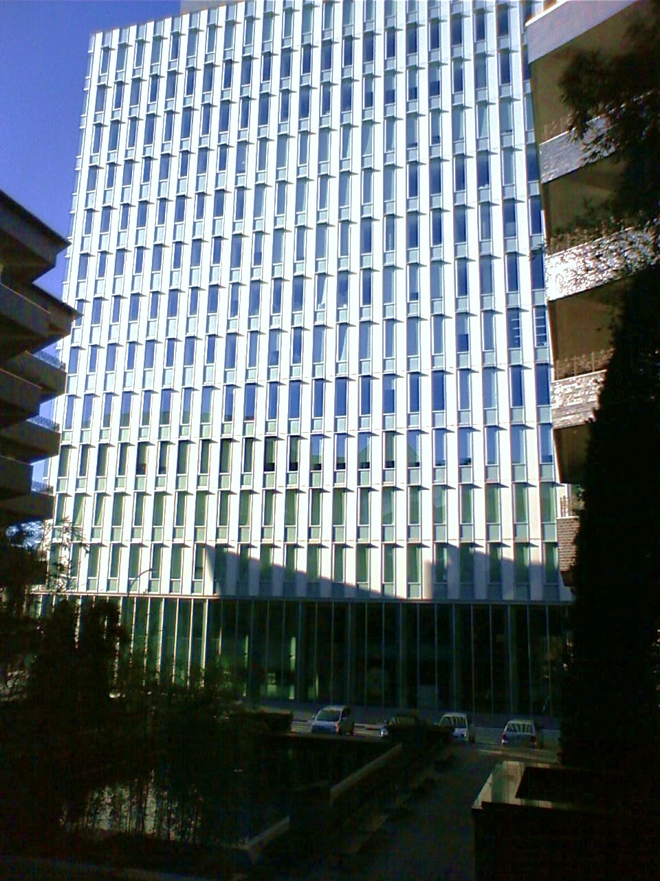 藤田学園生涯教育研修センター1号館